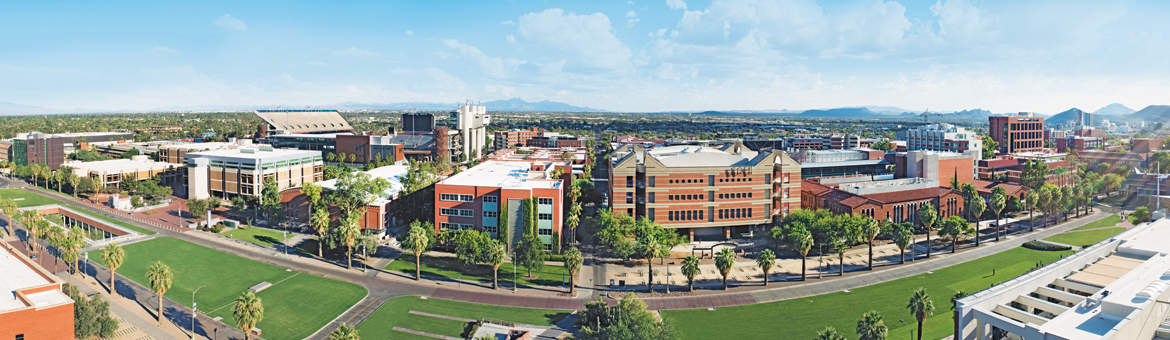 학교의 전경 사진